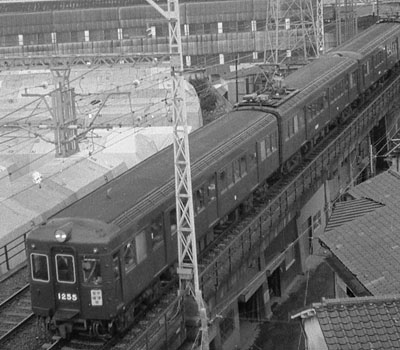 阪急 1255 1981年頃 西宮北口-阪神国道